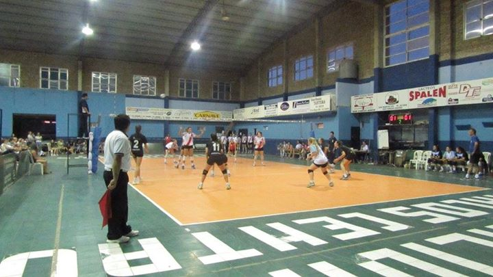 Cancha de Voley - Argentino de San Carlos